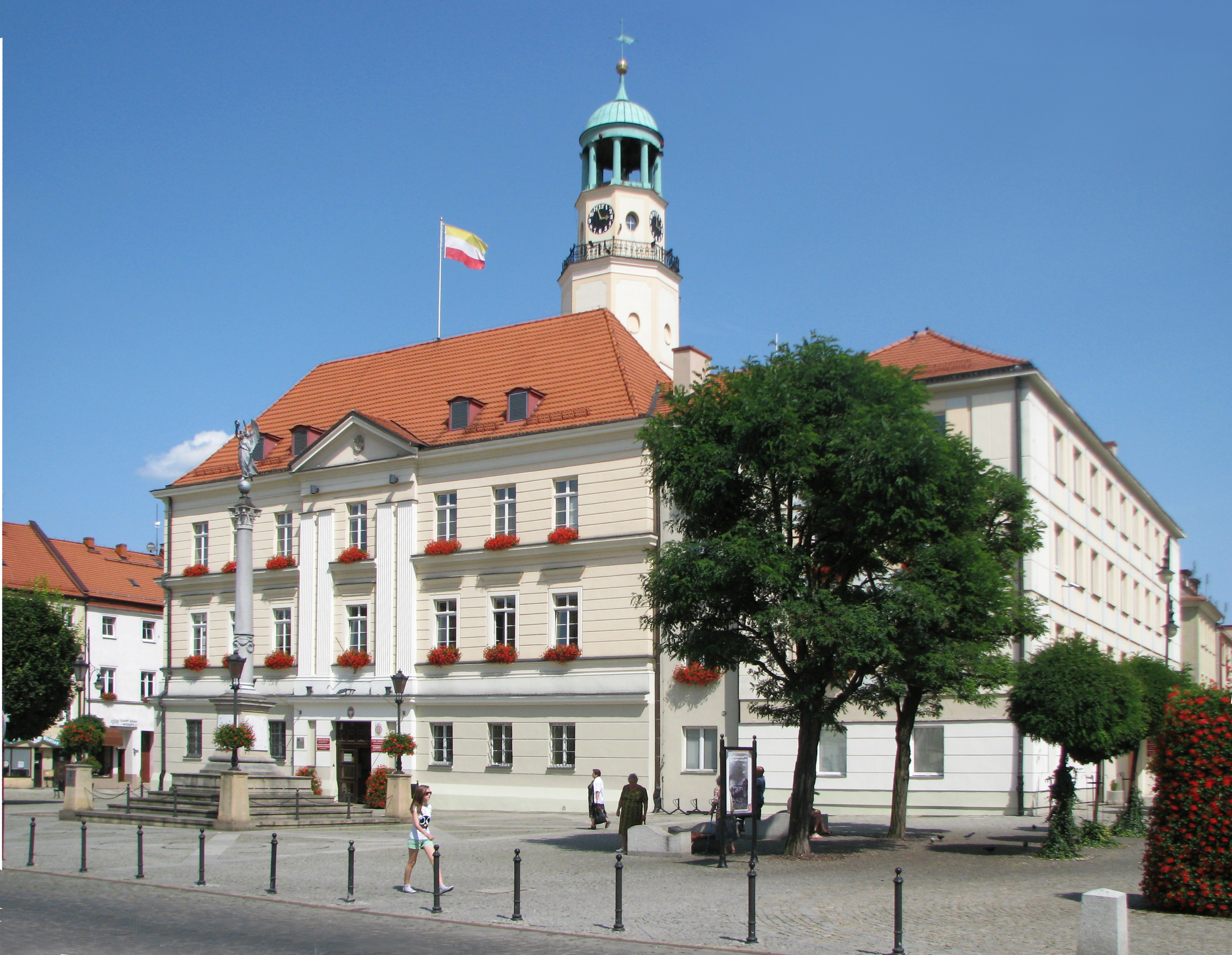 Ratusz w Oleśnicy, z pocz. XV w., 1536, 1750 r.